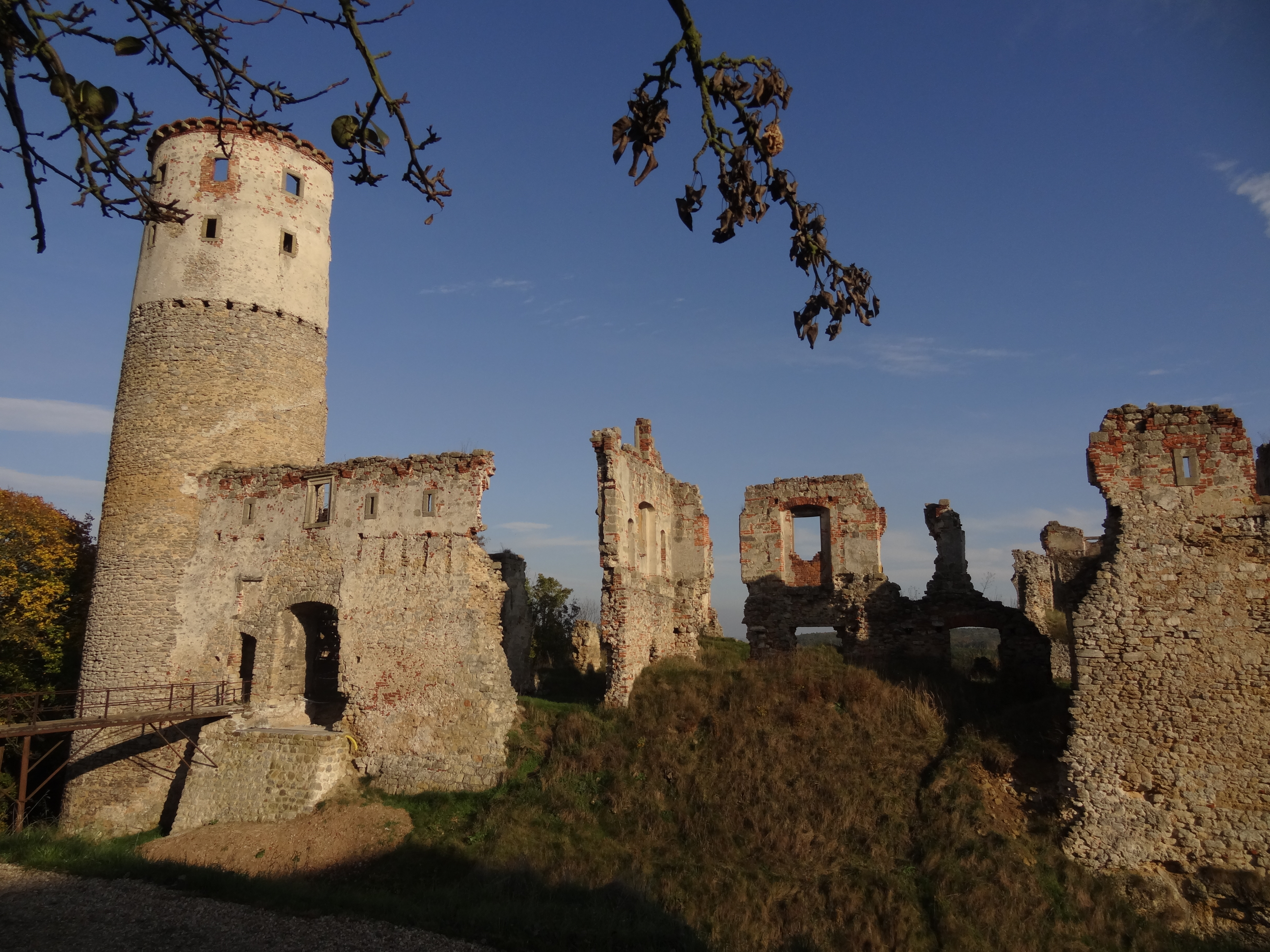 Hrad Zvířetice, západně od vsi, Podhradí (Bakov nad Jizerou).